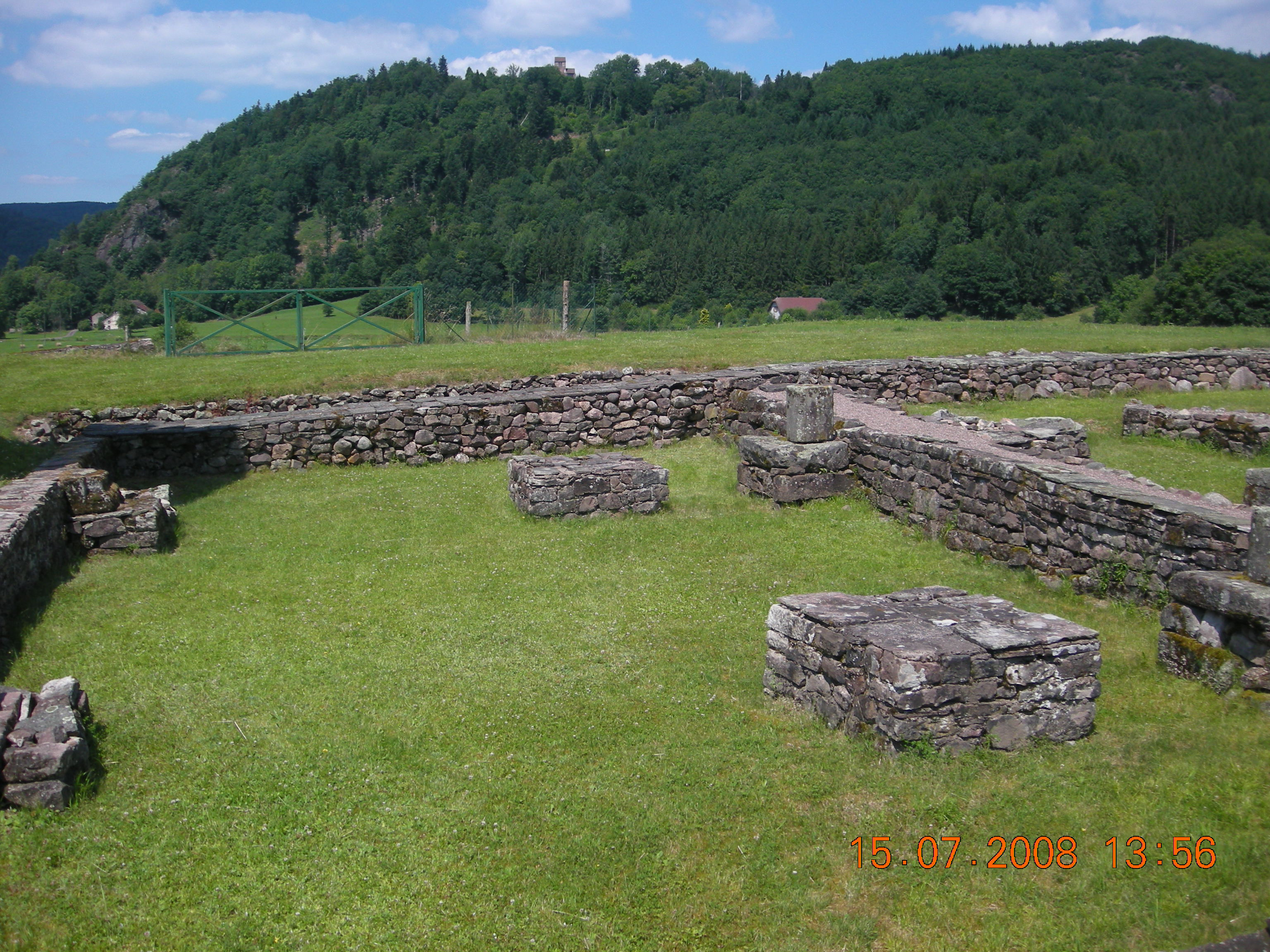 Annegray (France): Ruines des églises du XIème et XVIIIème bâties sur l’emplacement du monastère établi par Sain-Colomban. En arrière plan à gauche, la colline Saint Martin avec sa chapelle (XIIème) du même nom en son sommet d’où une magnifique vue sur le site colombanien d’Annegray est disponible.